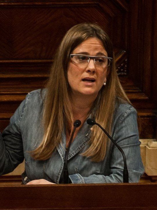 Foto: Parlament de Catalunya